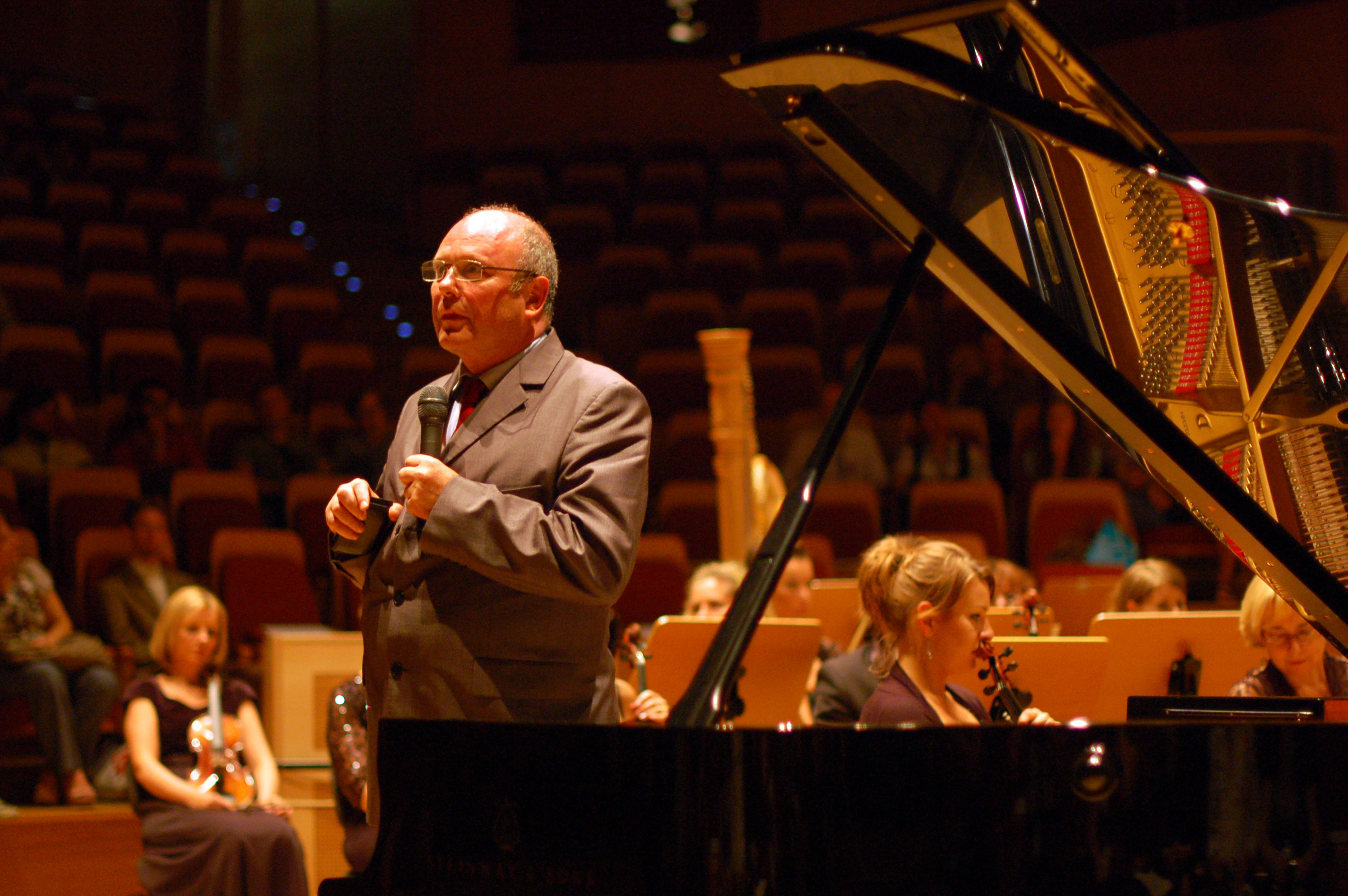 Wikimania Gdansk 2010